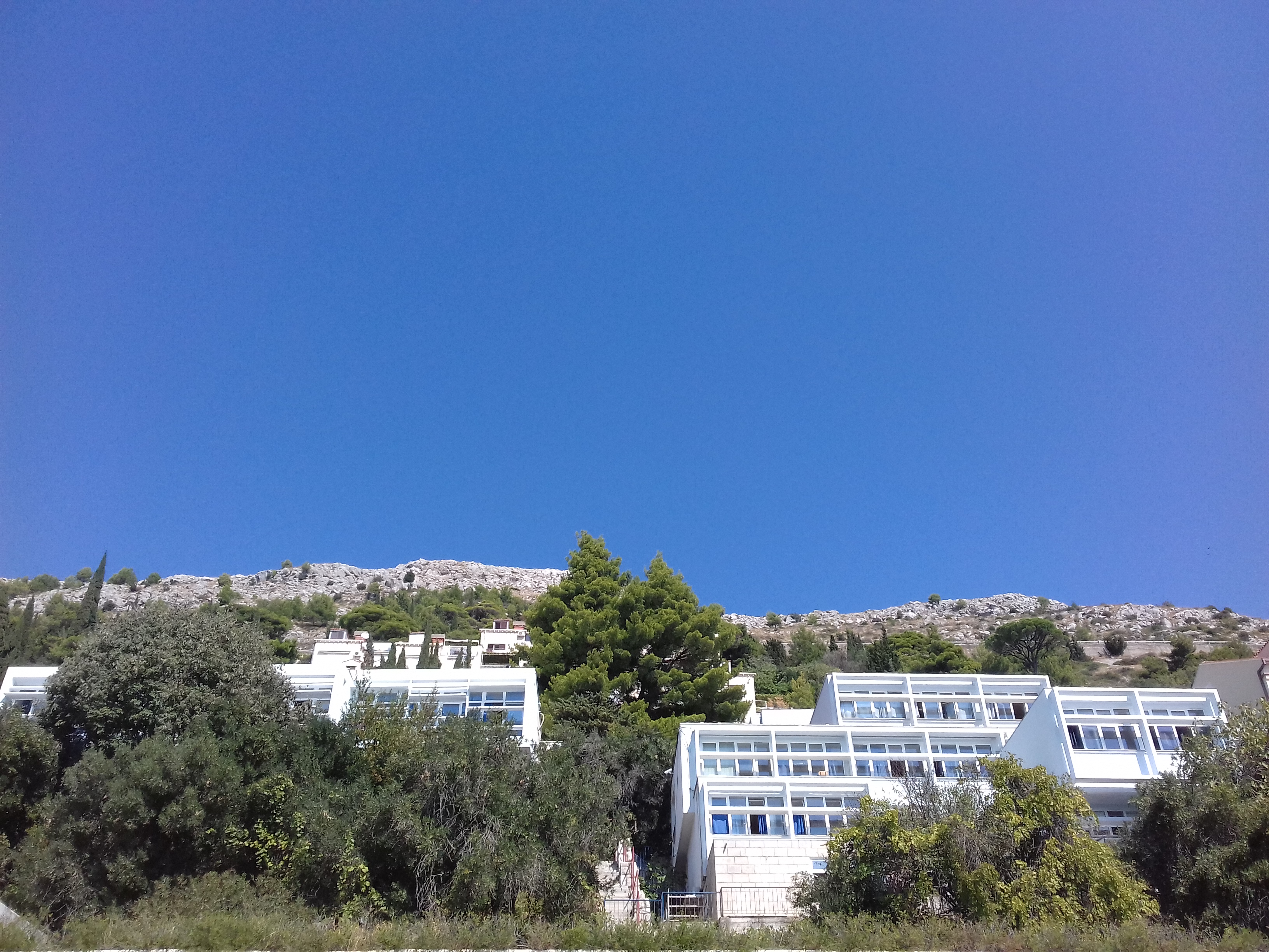 Zgrade Turističke i ugostiteljske škole u Dubrovniku